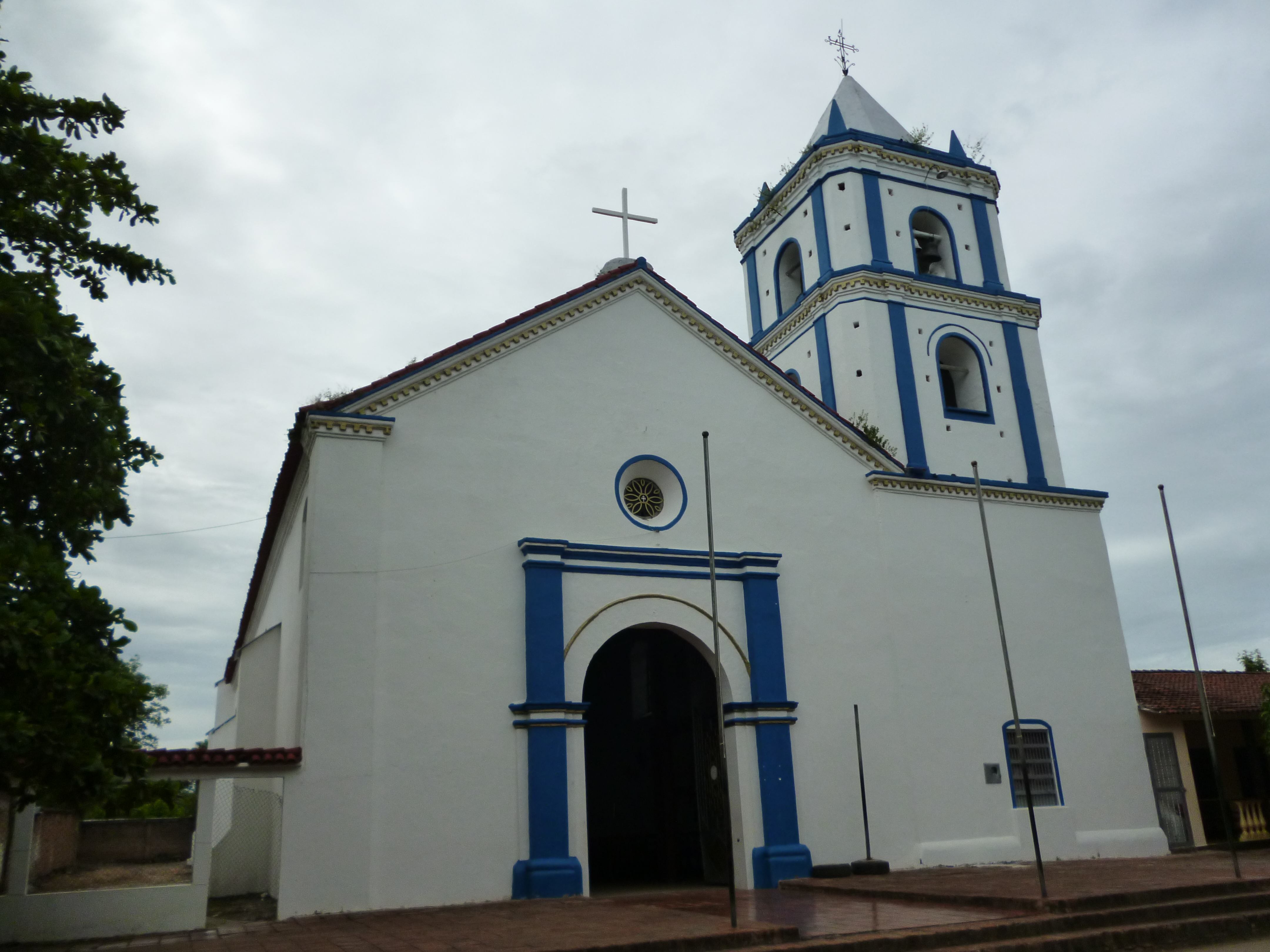 Iglesia principal de Villavieja